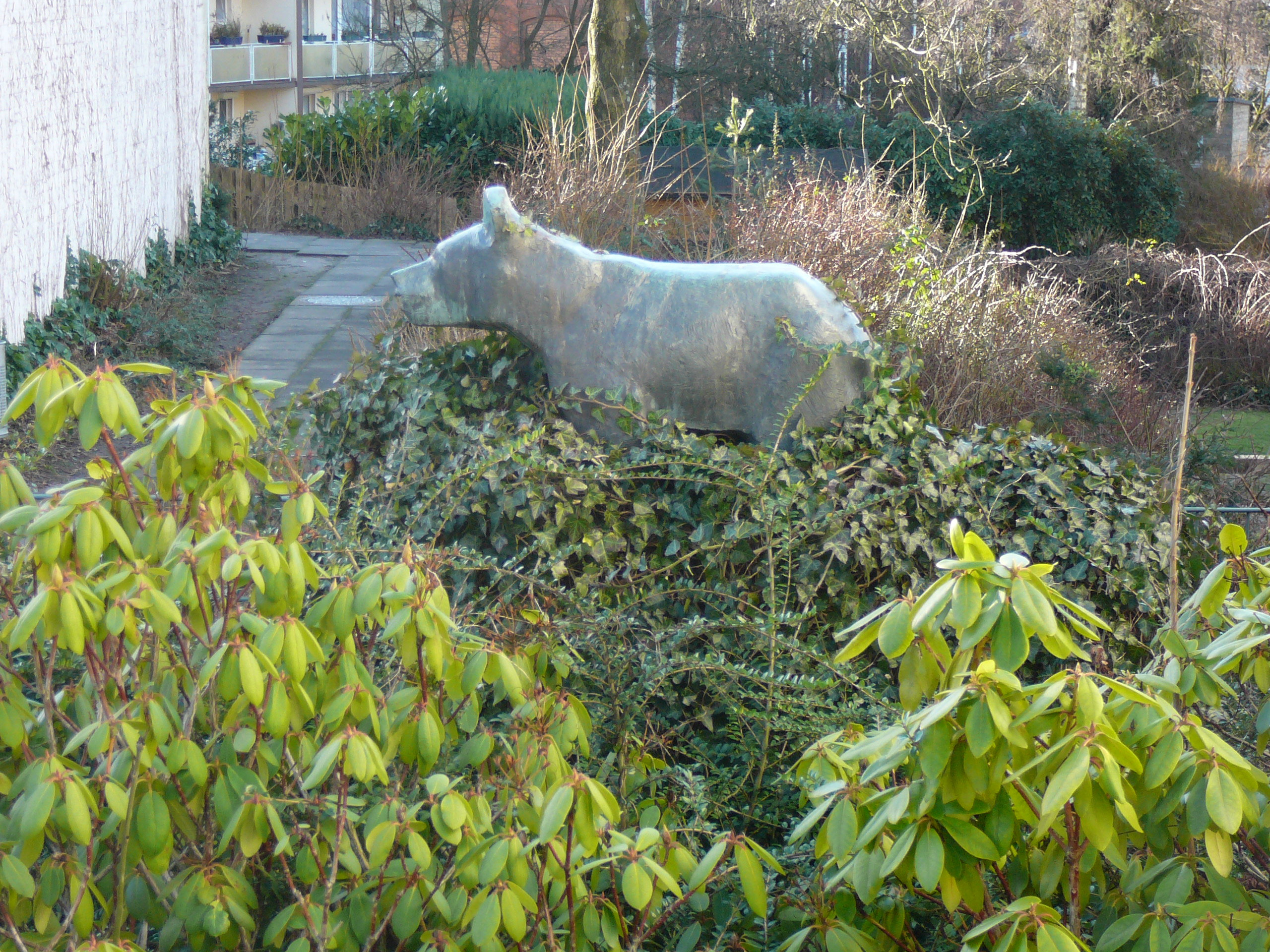 Kyffhäuserstr, Wuppertal